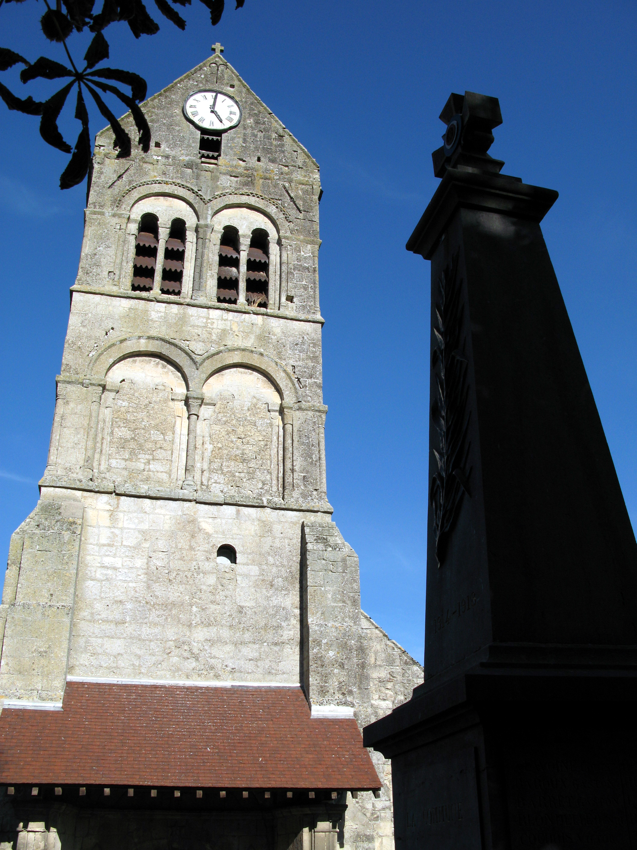 Orrouy (Oise, France) - Le clocher et le monument aux morts.